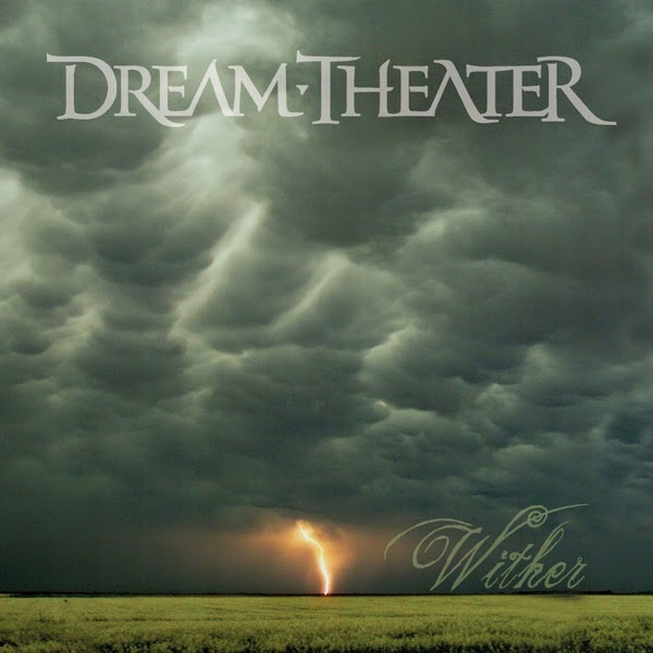 עטיפת המיני-אלבום Wither